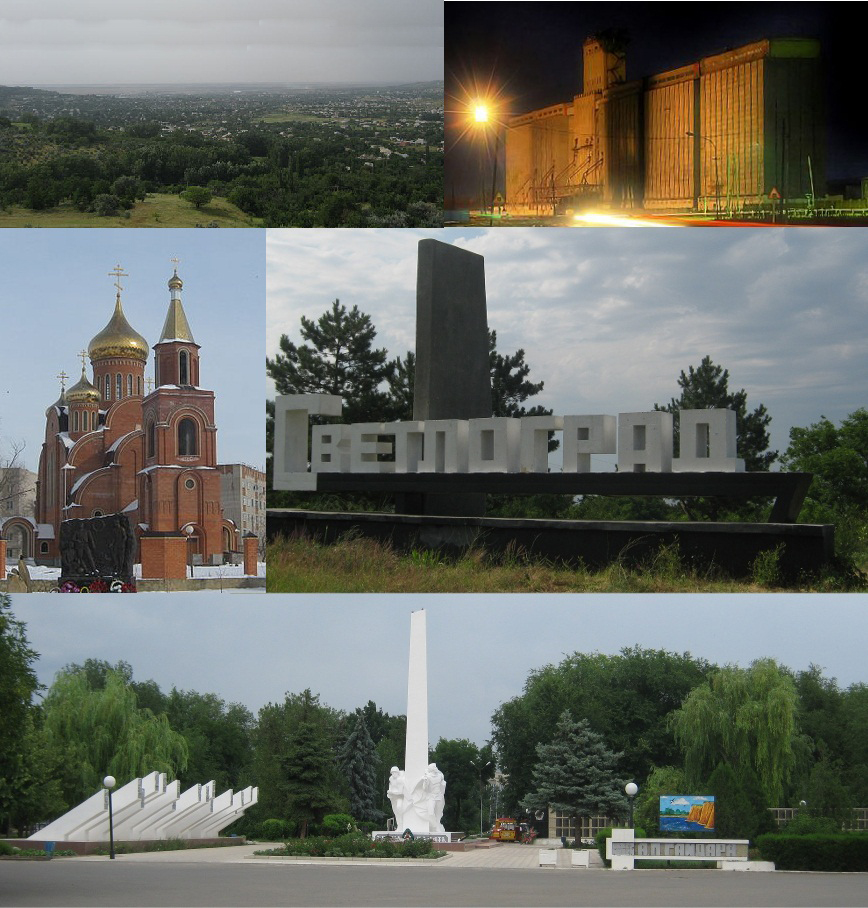 Коллаж города Светлоград